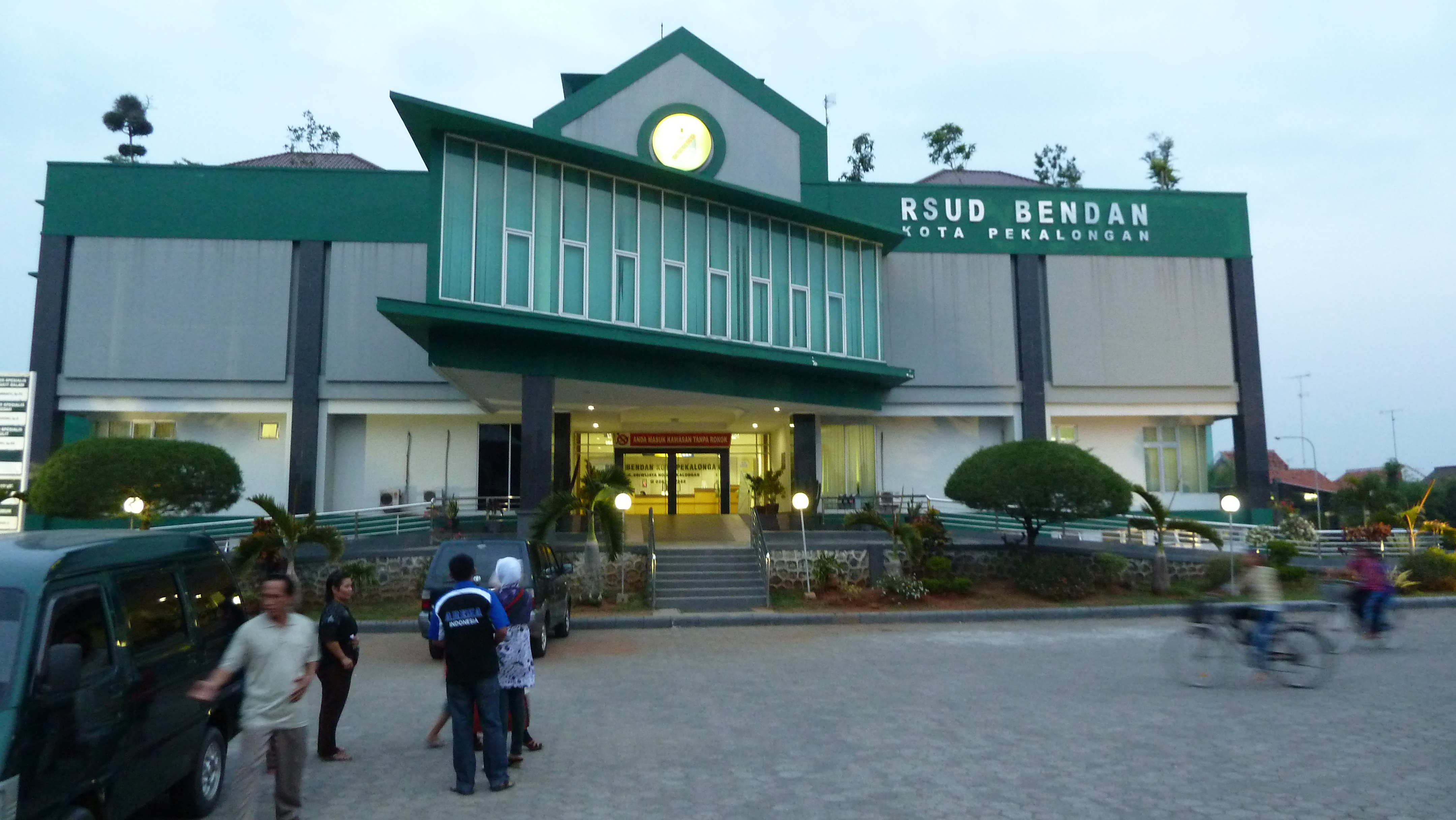 RSUD Bendan